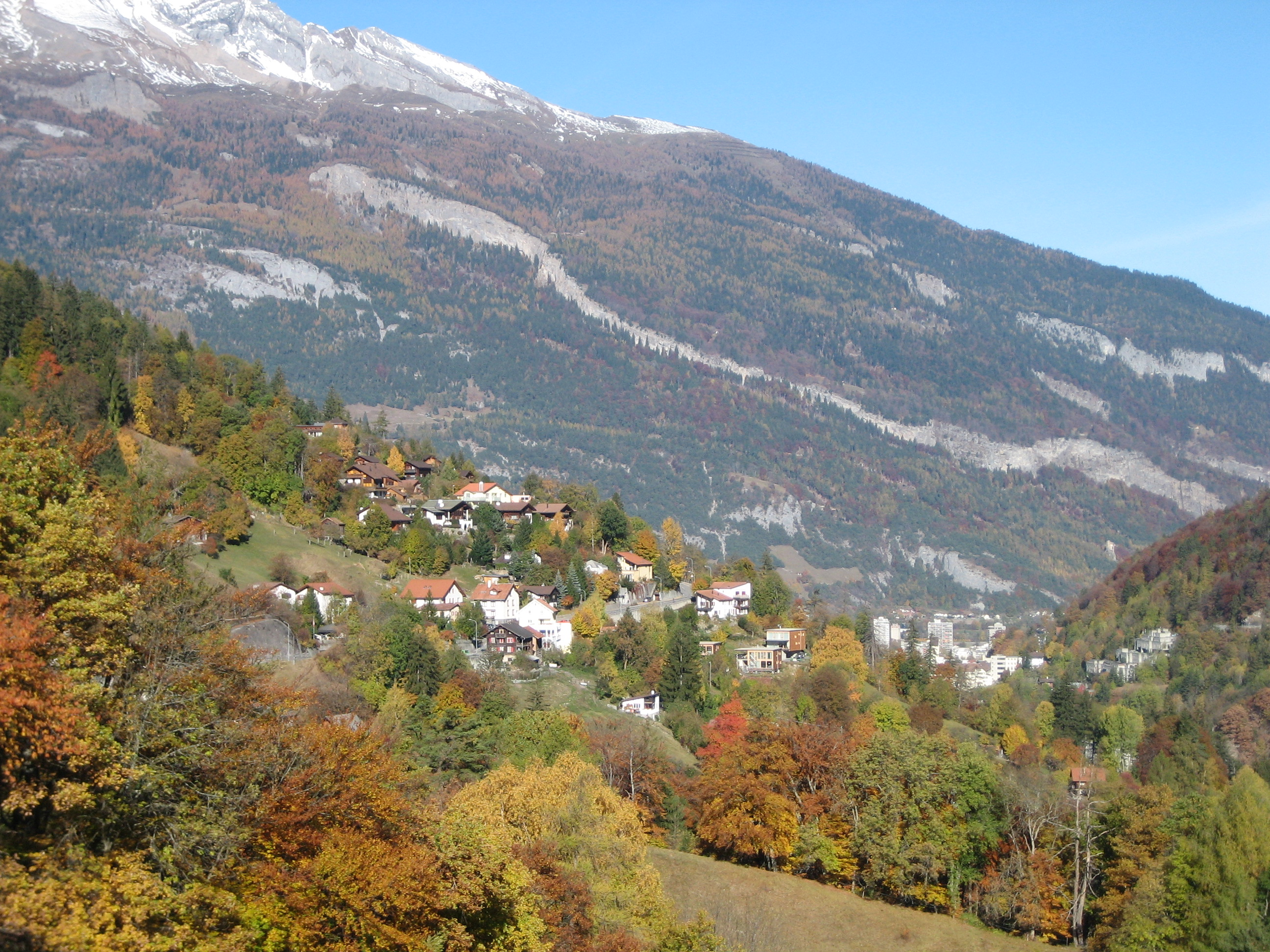 Chur Araschgen